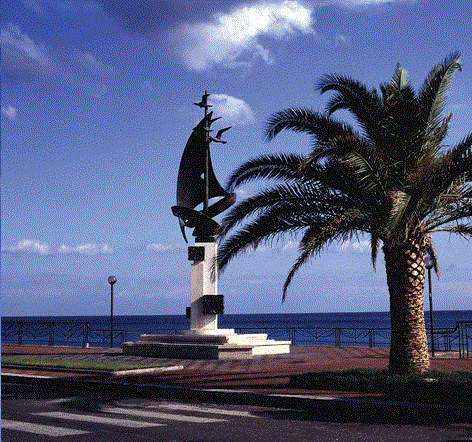 Monumento al marinaio